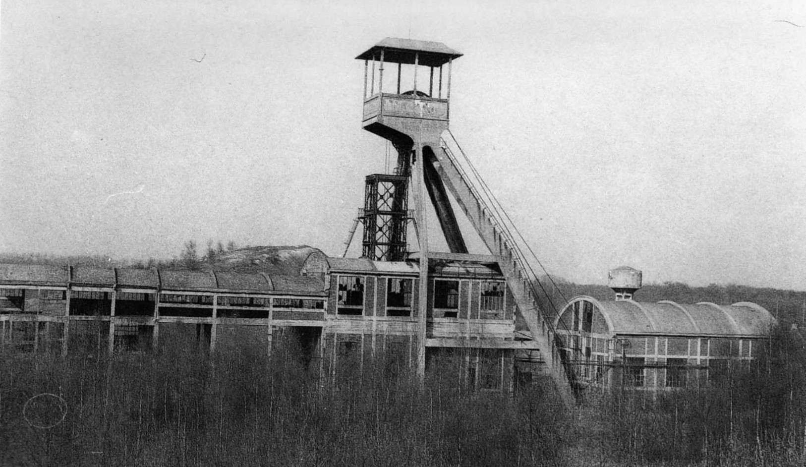 La Fosse n° 3 ou Ewbank de la Compagnie des mines de Vicoigne était un charbonnage constitué d'un seul puits situé à Raismes, Nord, Nord-Pas-de-Calais, France.